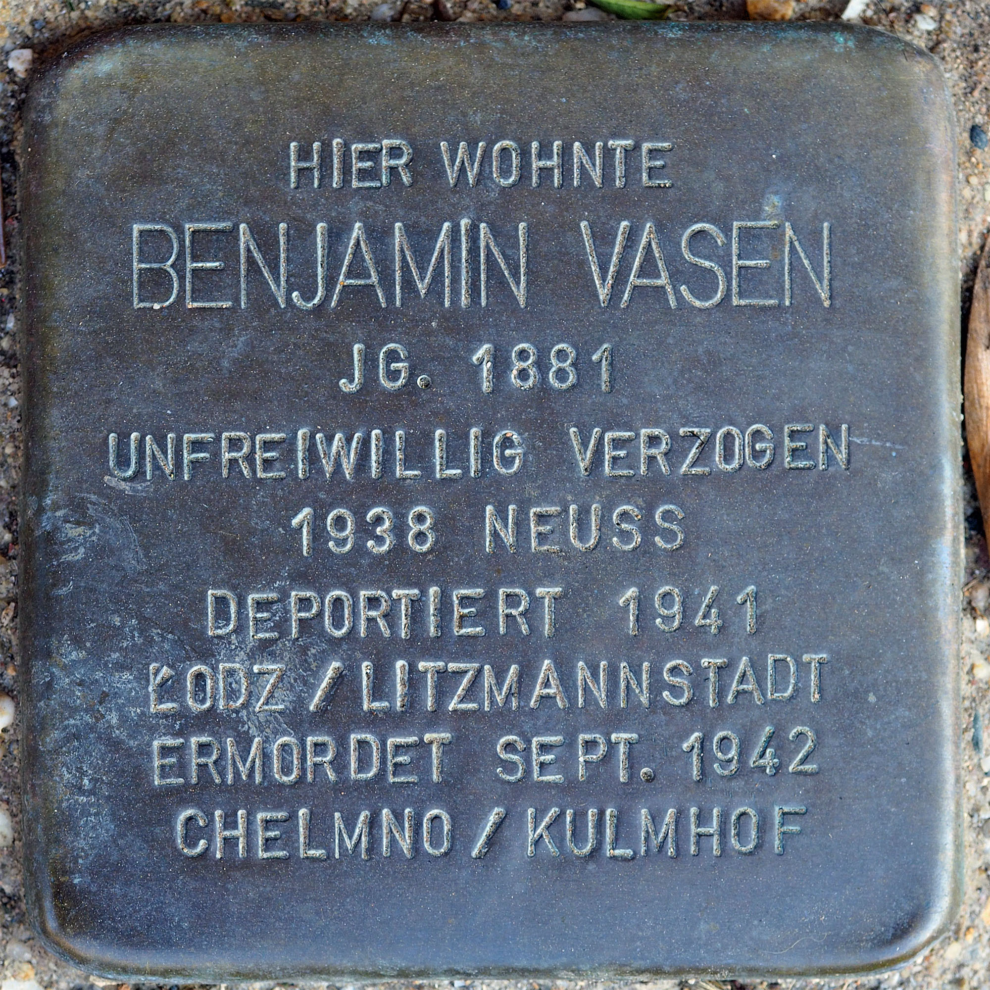 Stolpersteine GV: Vasen, Benjamin